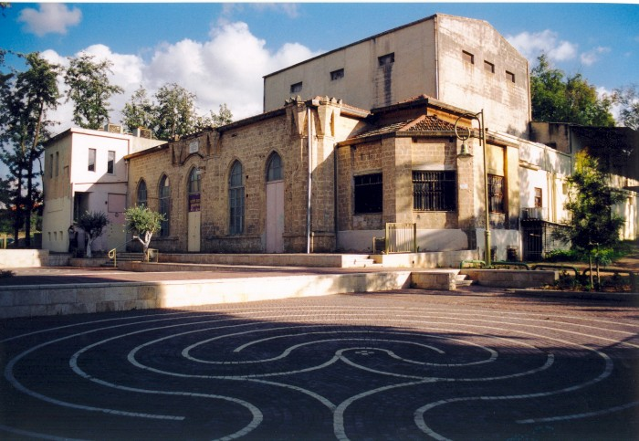 בית העם - שימש כמרכז החיים התרבותיים של המושבה בסגנון אקלקטי אופייני המזכיר טירה עתיקה ומשלב אלמנטים מחומת ירושלים.